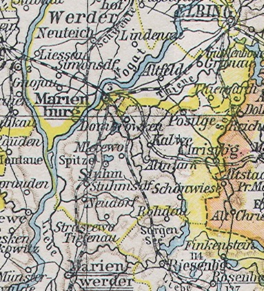 Kreis Stuhm in Westpreußen, Ausschnitt aus File:Ost-_und_Westpreussen.jpg